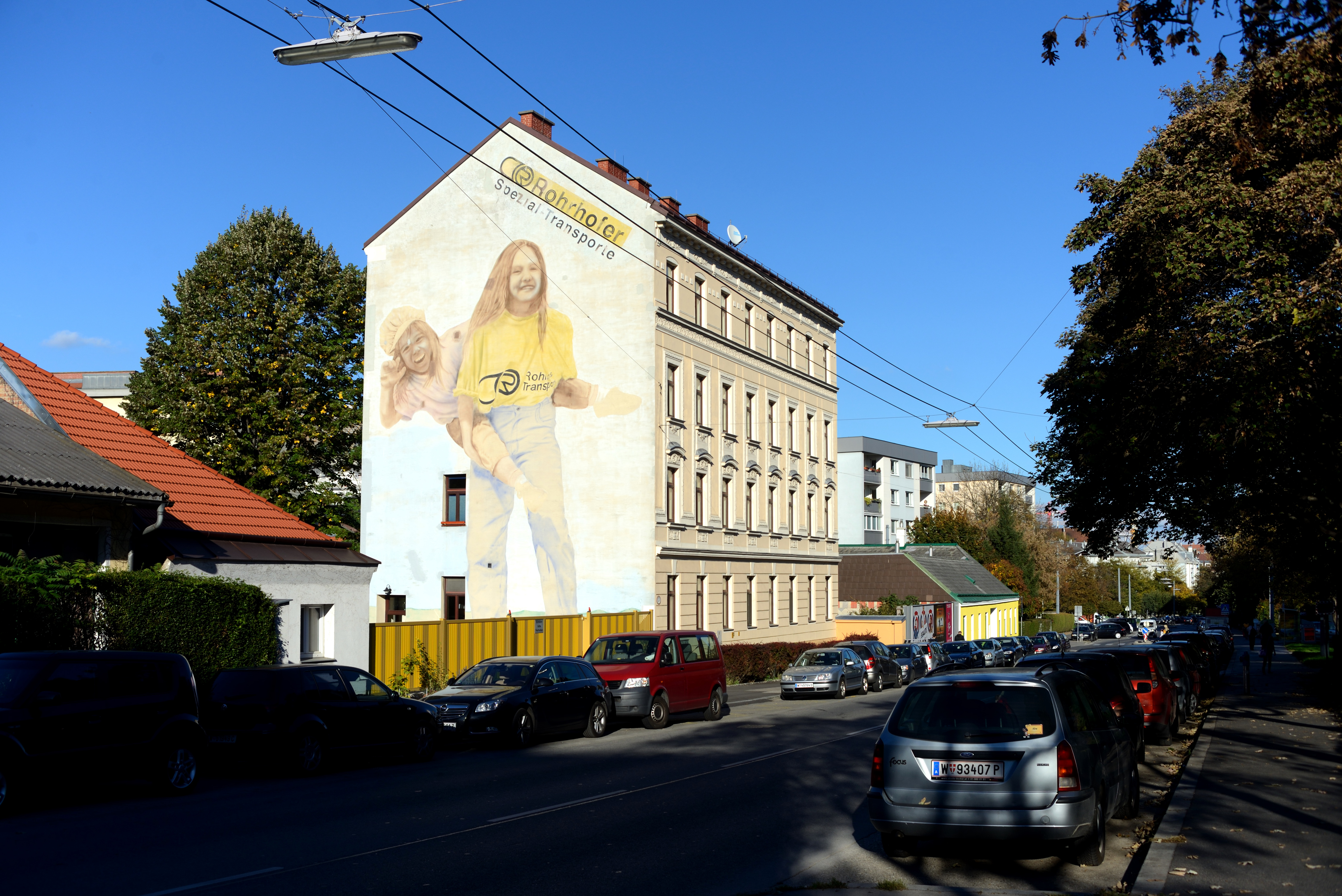 Haus Kopalgasse 7 mit Rohrhofer-Werbung